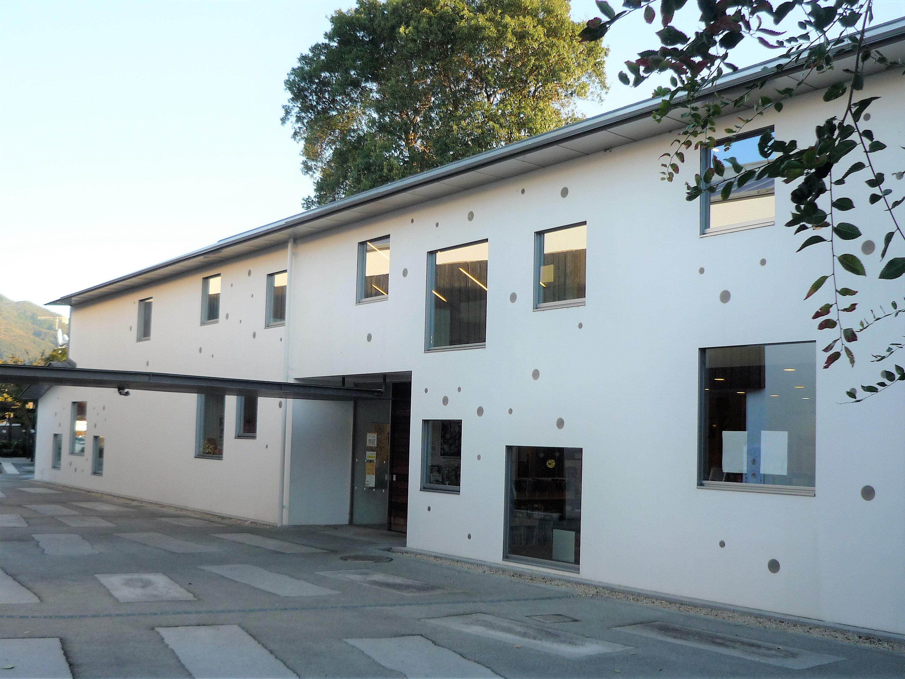 桜川市図書館 真壁図書館（真壁伝承館内） Panasonic Lumix DMC-FS3